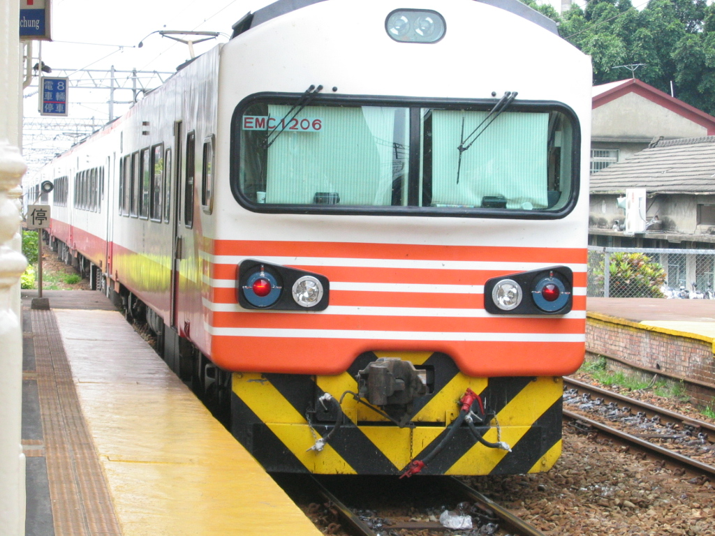 中文（台灣）: 臺灣鐵路管理局電聯車EMU1206離開臺中車站，車尾編號EMC1206。